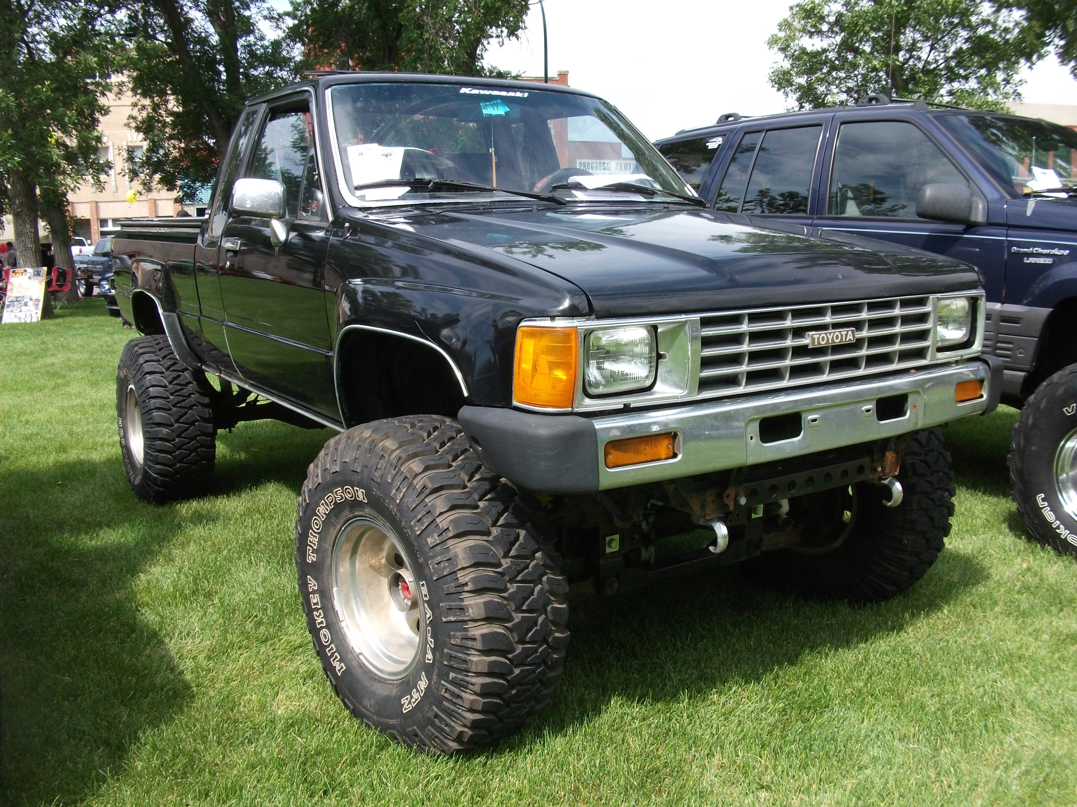 4x4 Toyota truck